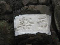 宇文炫所題